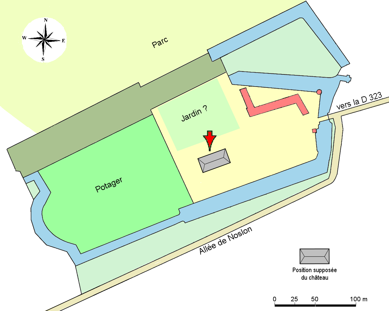 Plan approximatif du domaine de Noslon vers 1800.